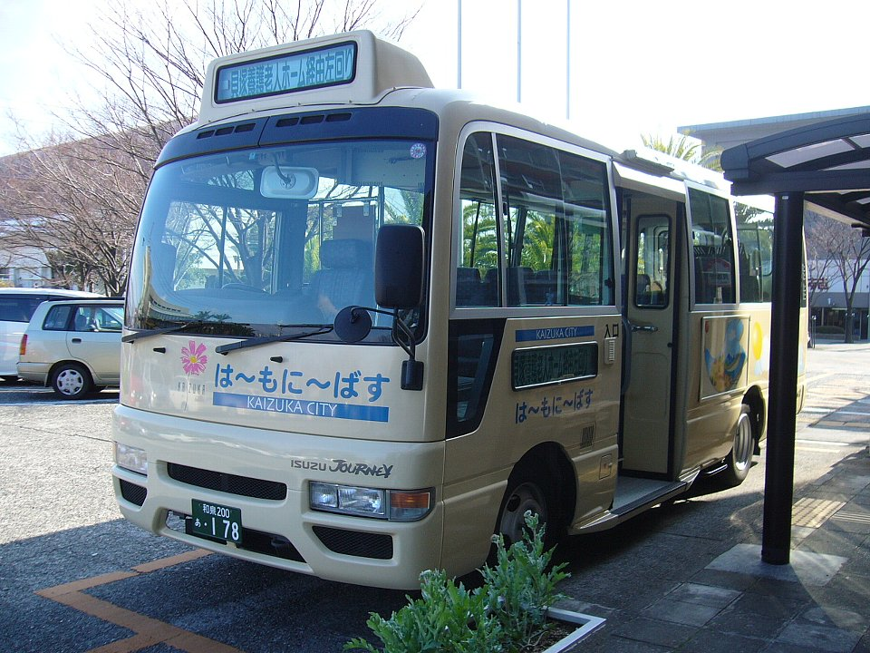 は〜もに〜ばす 海手ルート系統 貝塚市役所前にて いすゞ・ジャーニー 2007年1月25日 Bakkai撮影